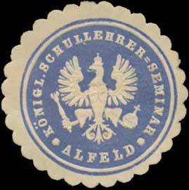 Sealing stamp Title: Königl. Schullehrer-Seminar Alfeld Description: blau, weiß, geprägt Place: Alfeld size: 3 cm